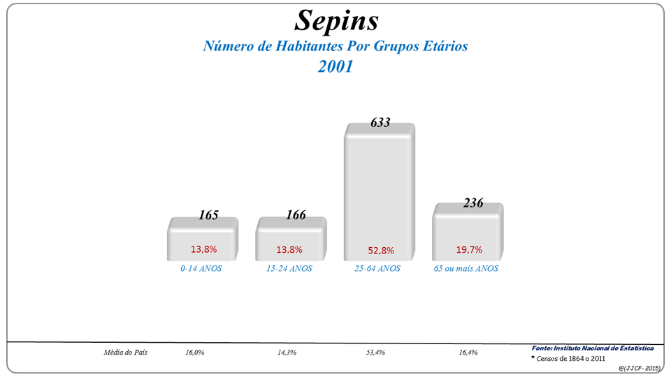 População